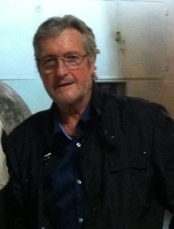 André Cagnard prise en 2009